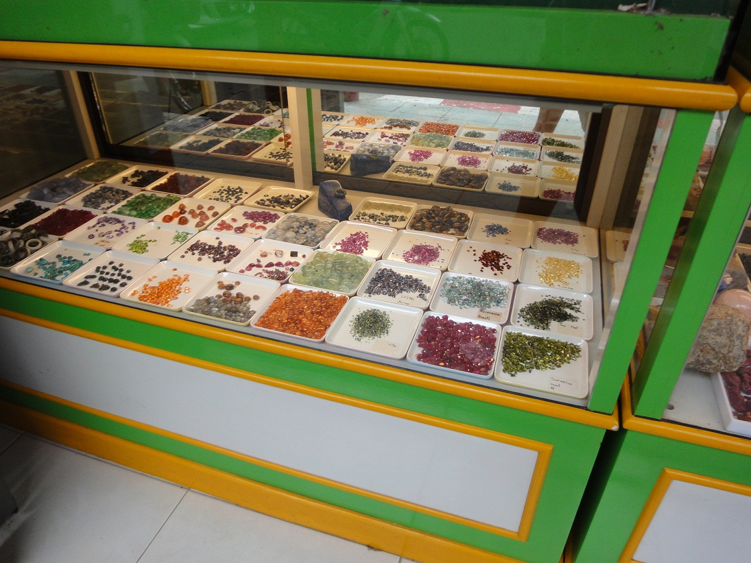 Chanthatburi pierre precieuse 2011